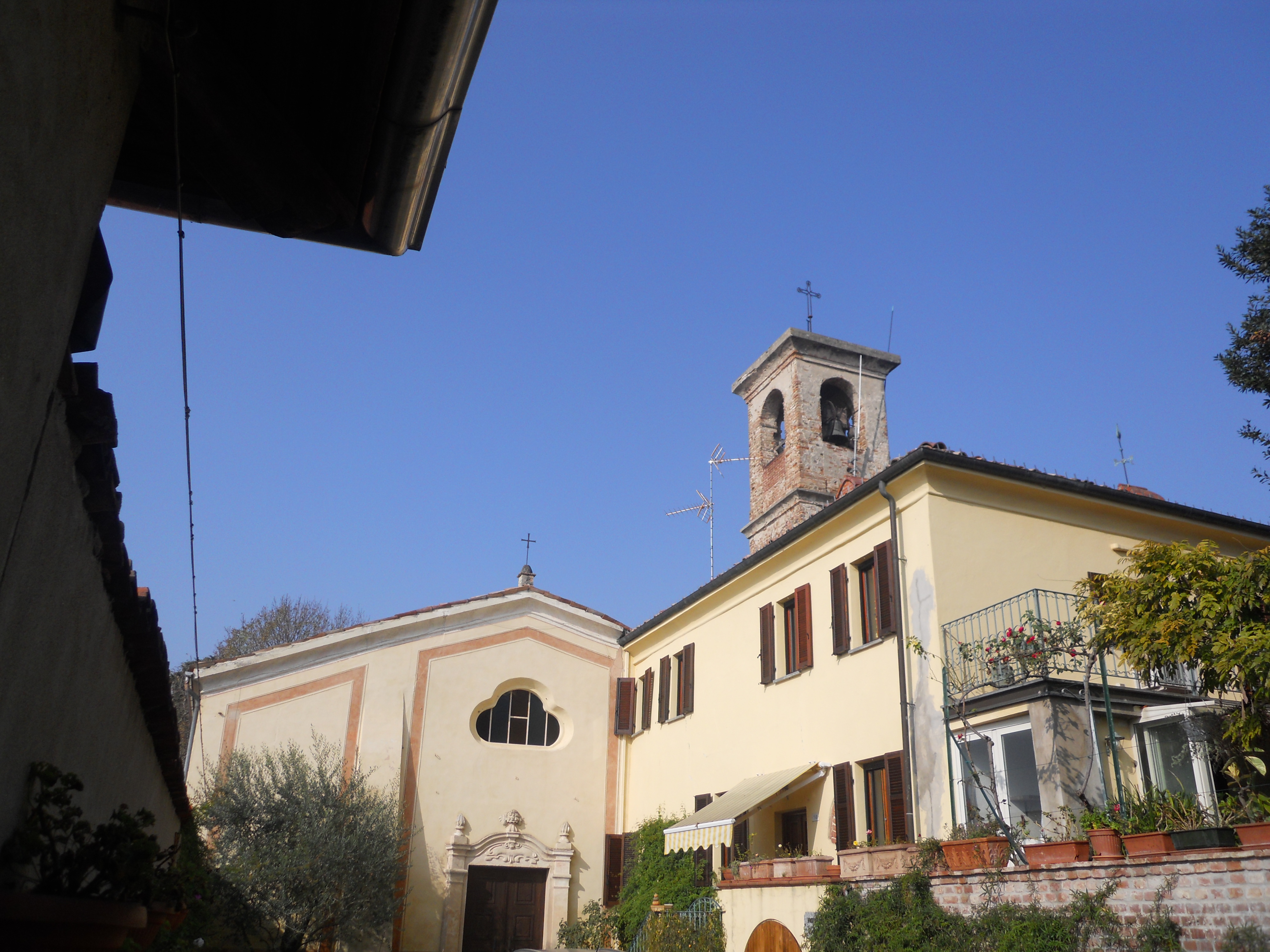 Resti del Monastero di Rocca delle Donne, trasformati in civile abitazione